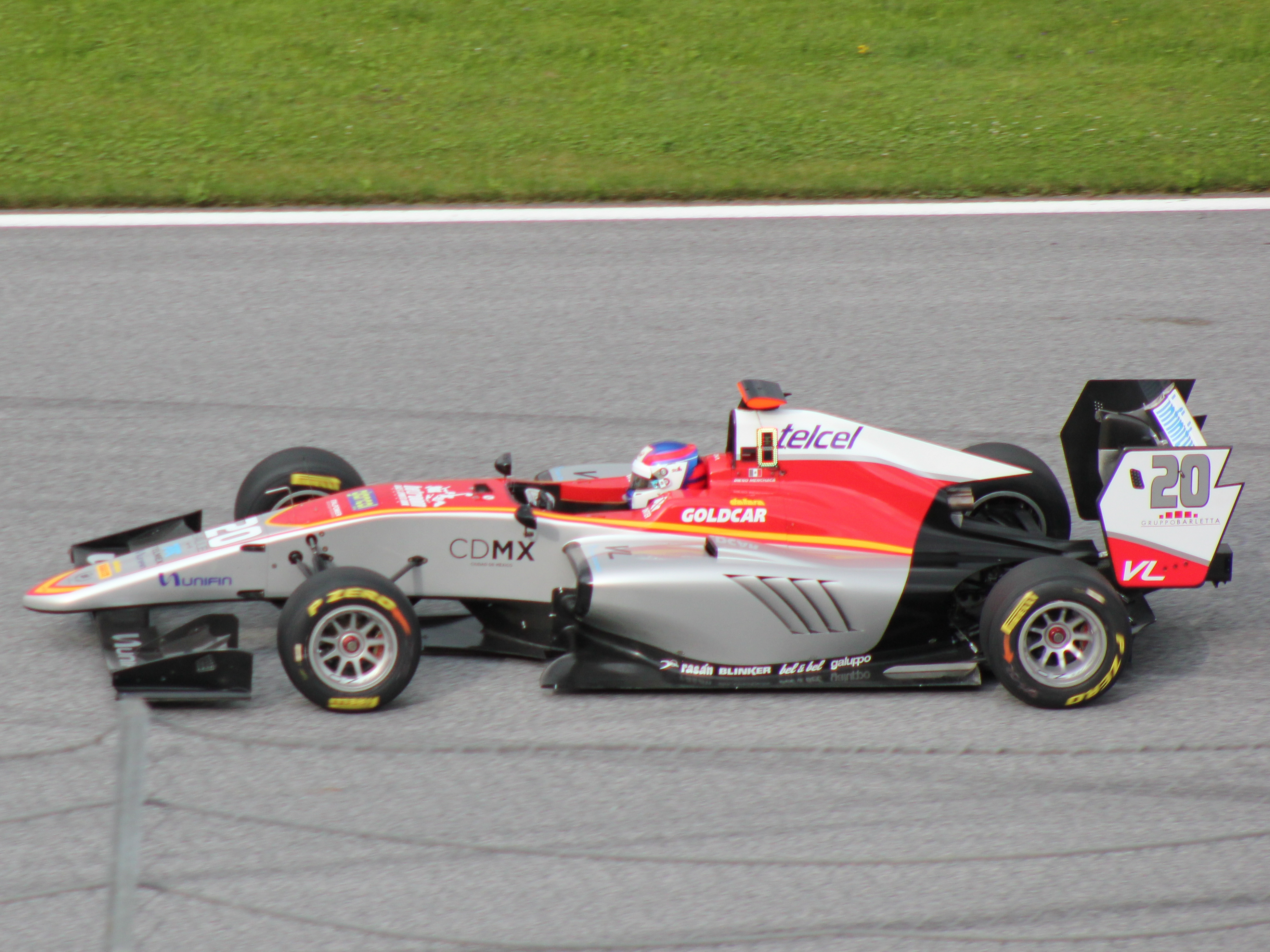 20 Diego Menchaca beim Rennwochenende in Österreich 2018